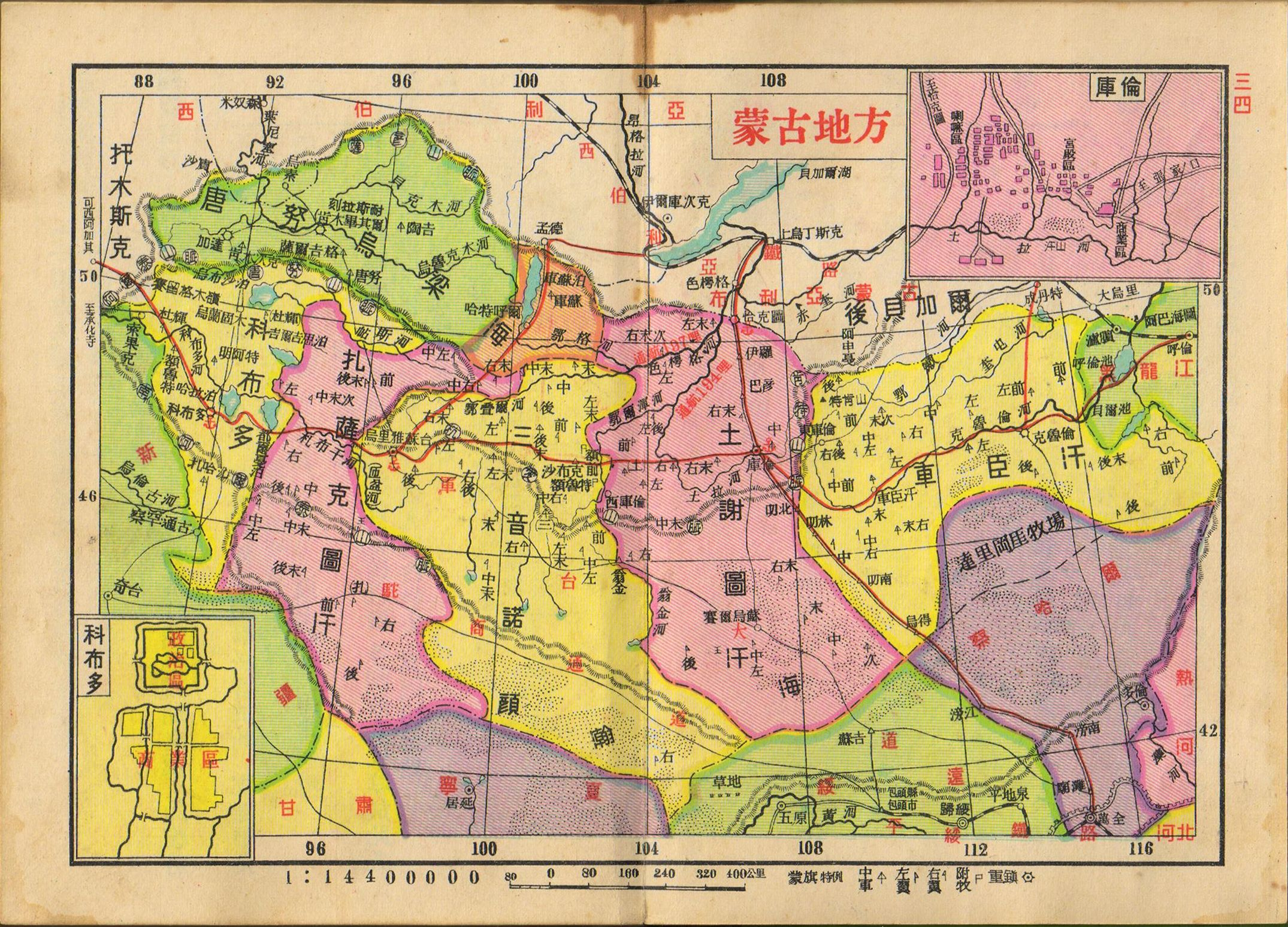 亚新地学社1936年《袖珍中华全图》蒙古地方